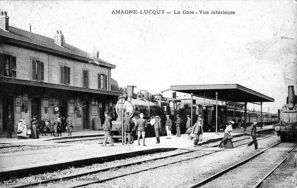 Gare ferroviaire d'Amagne-Lucquy (Ardennes, France), voies à l'intérieur de la gare.